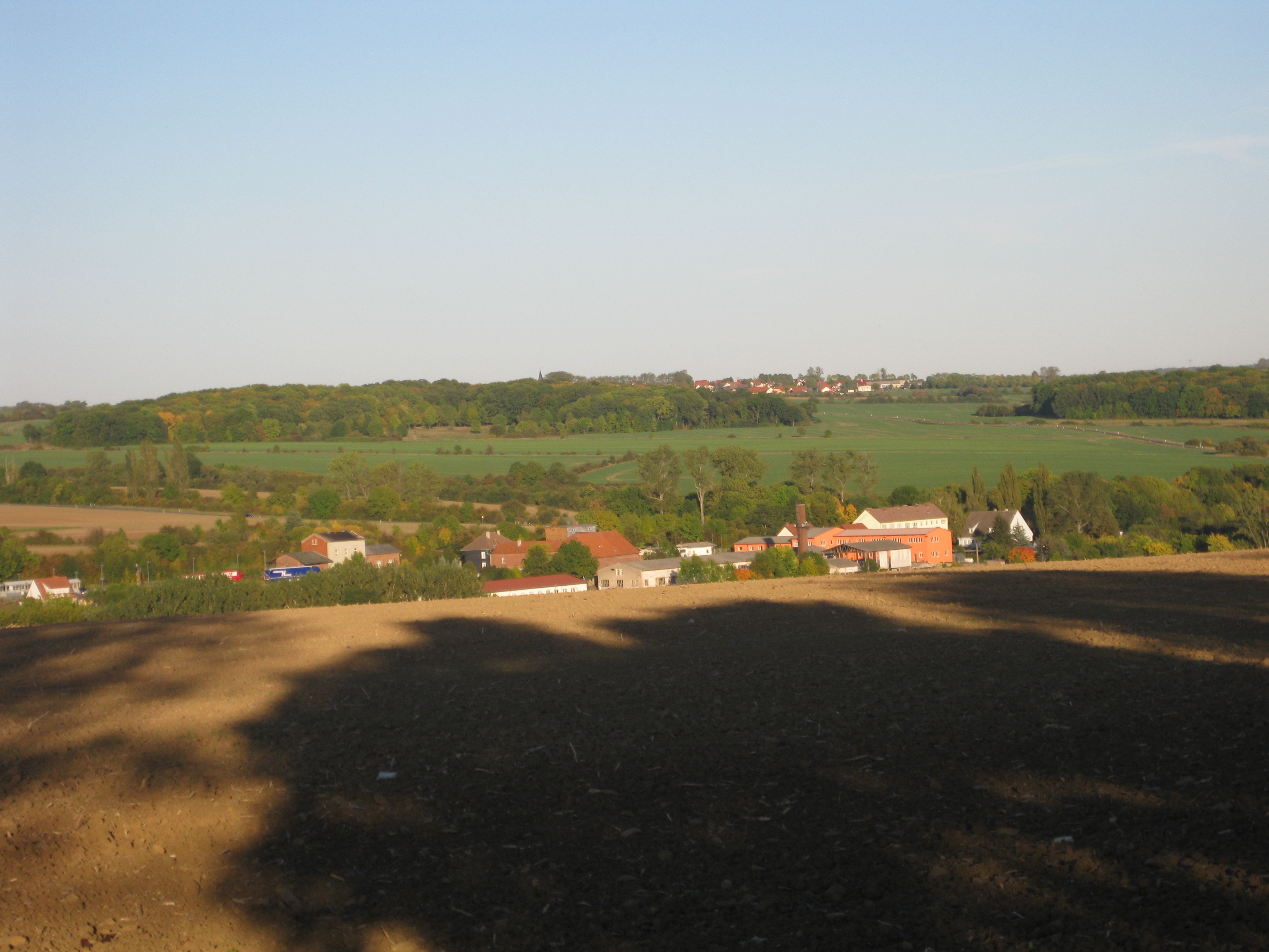 Dachrieden (mit Bahnhof) im Unstruttal und Kaisershagen im Hintergrund von der Langen Mark